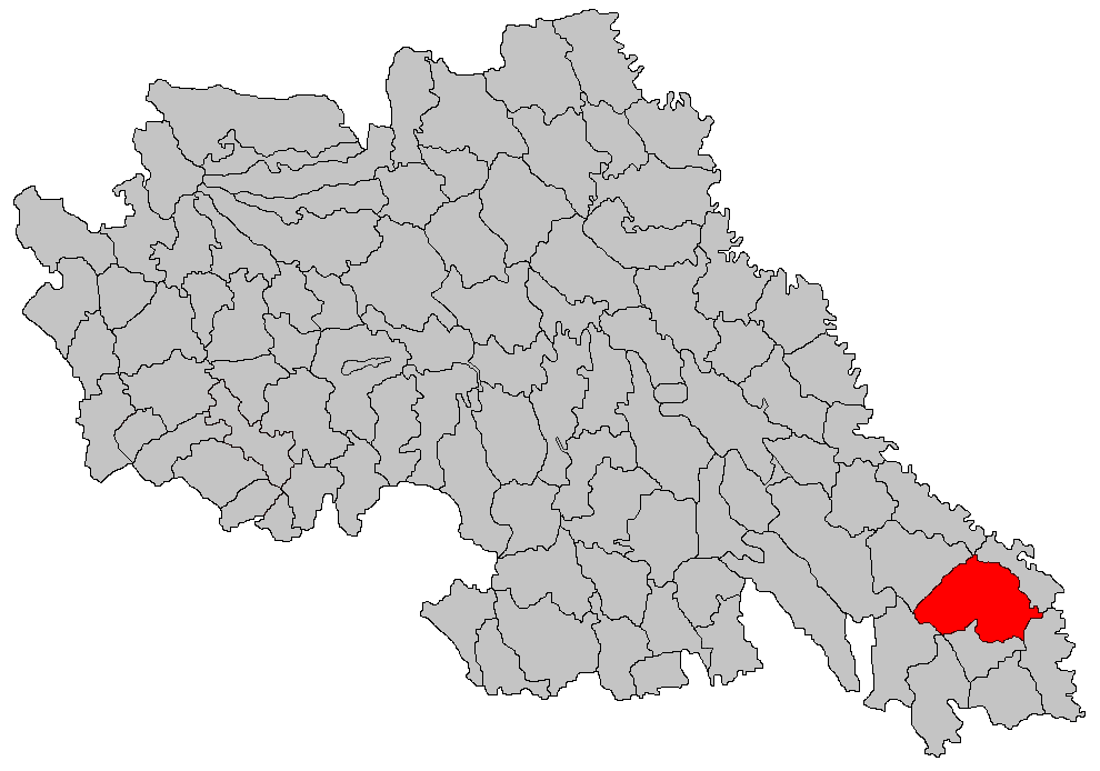 Categorie:Hărţi ale judeţului Iaşi